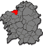 Mapa coa localización da Comarca da Coruña.